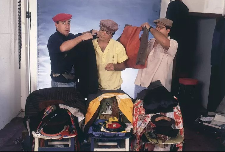 שלישיית הגשש החיוור